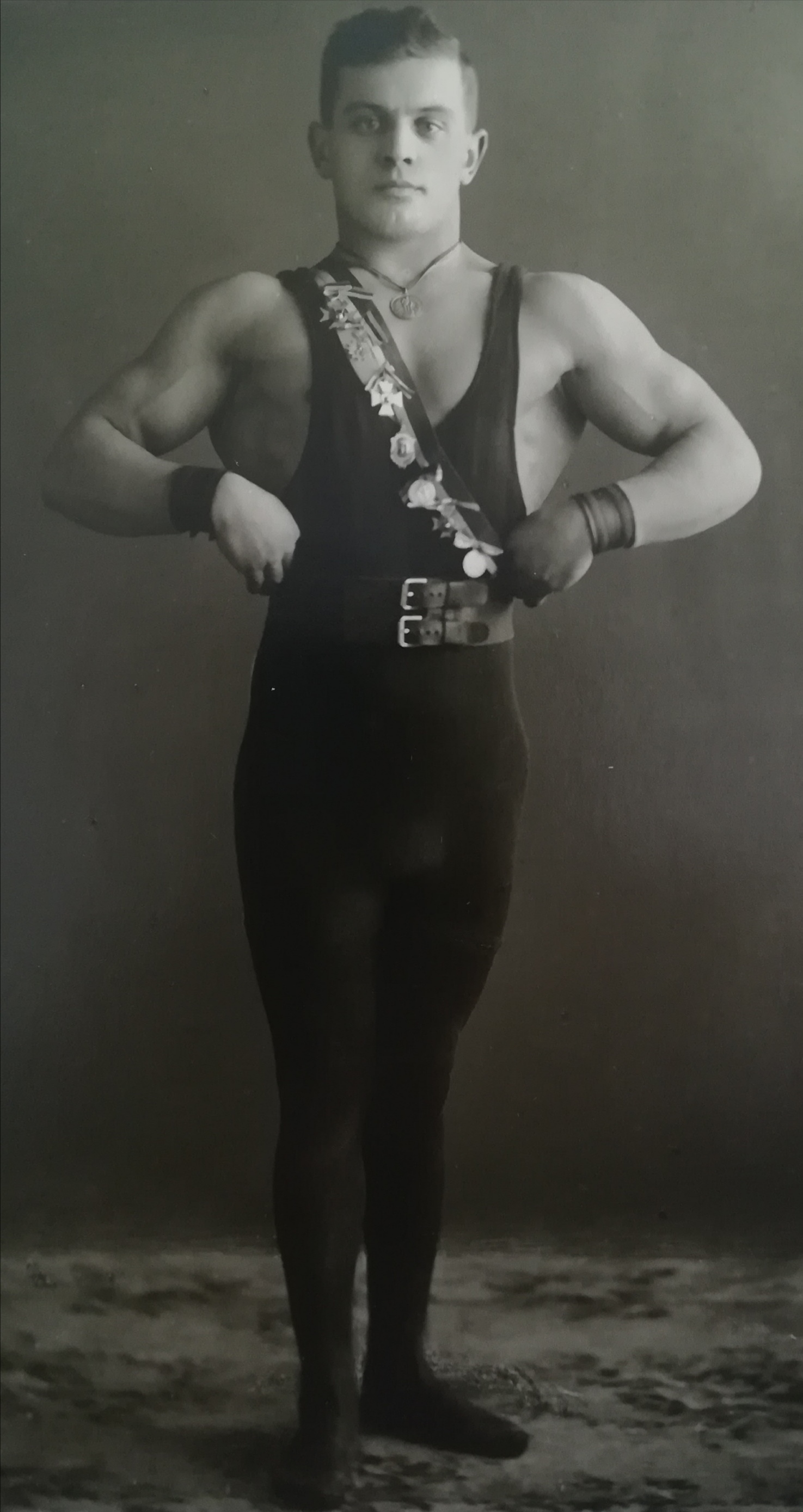 Viljandimaa jõustõstja, 1920ndad.